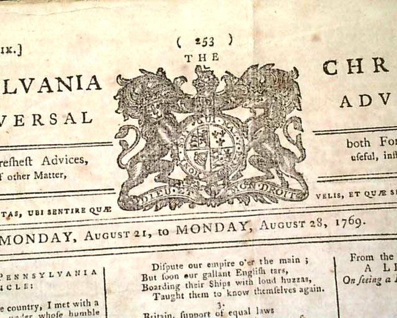 Pennsylvania Chronicle frontpage detail